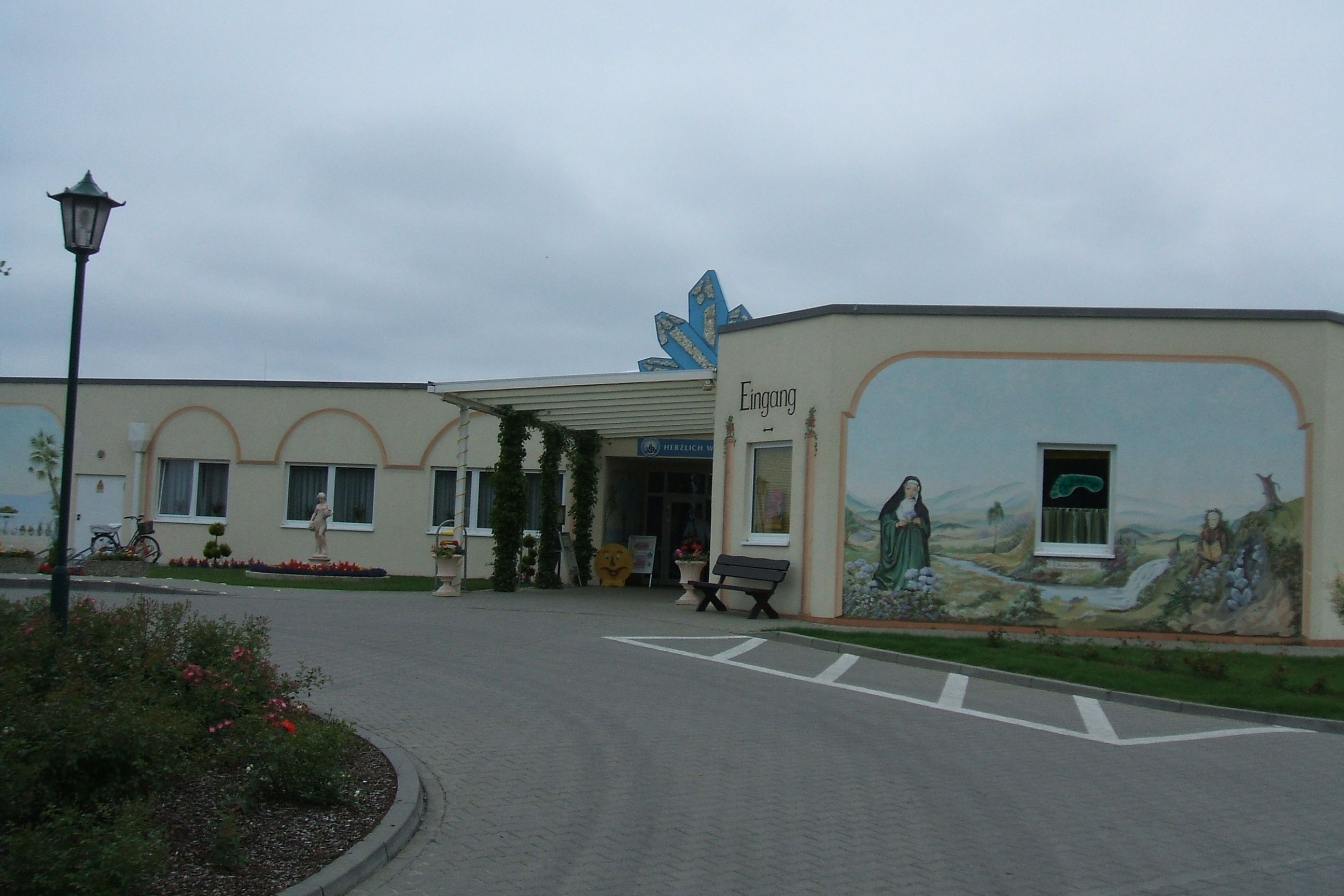 Bad Wilsnack, Deutschland, die Therme